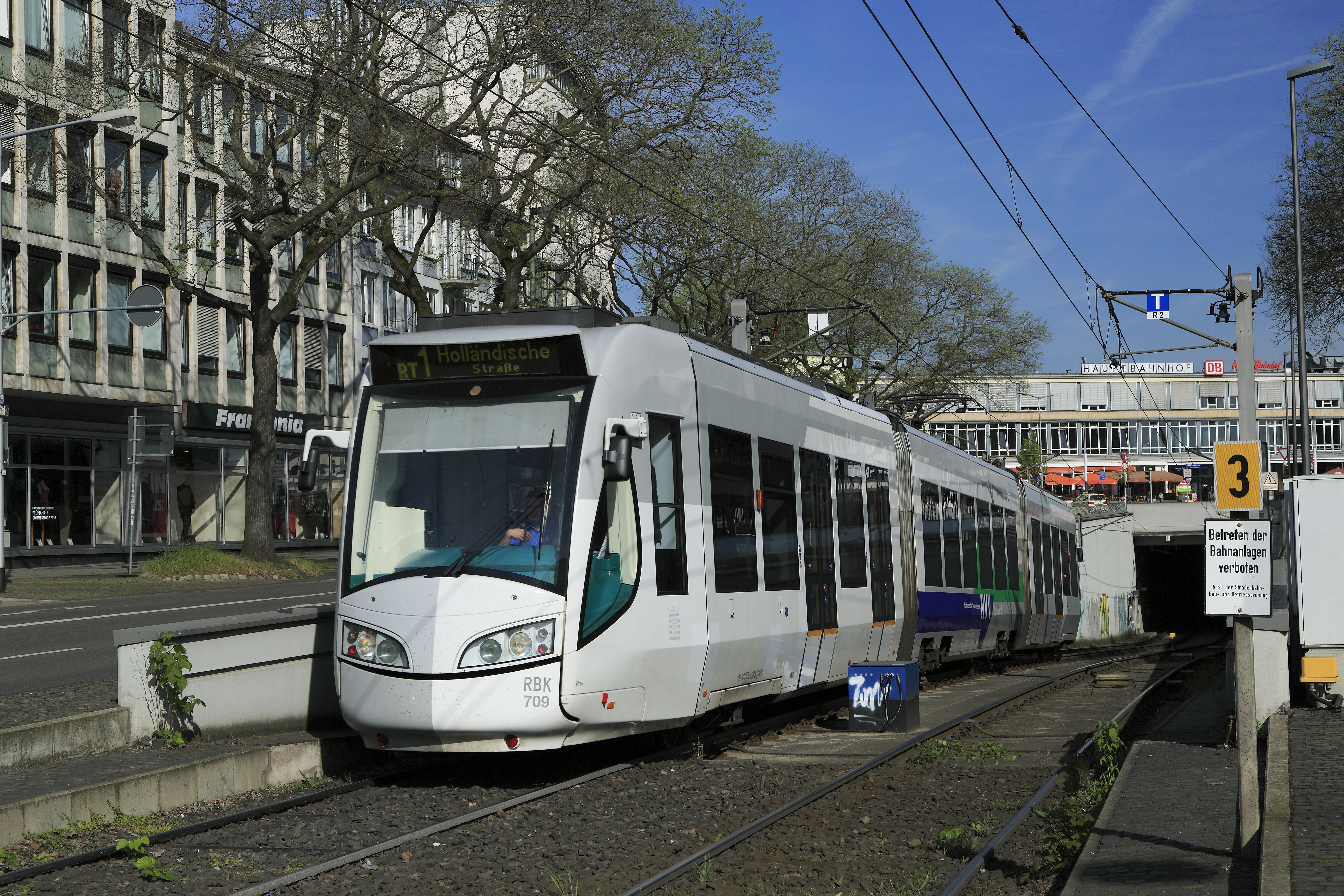 Ein Zug der Linie RT1 nach Kasssel, Holländische Straße zwischen dem Tunnel unter dem Kopfbau des Bahnhofs Kassel Hbf und dem Gleisdreieck am Scheidemannplatz.